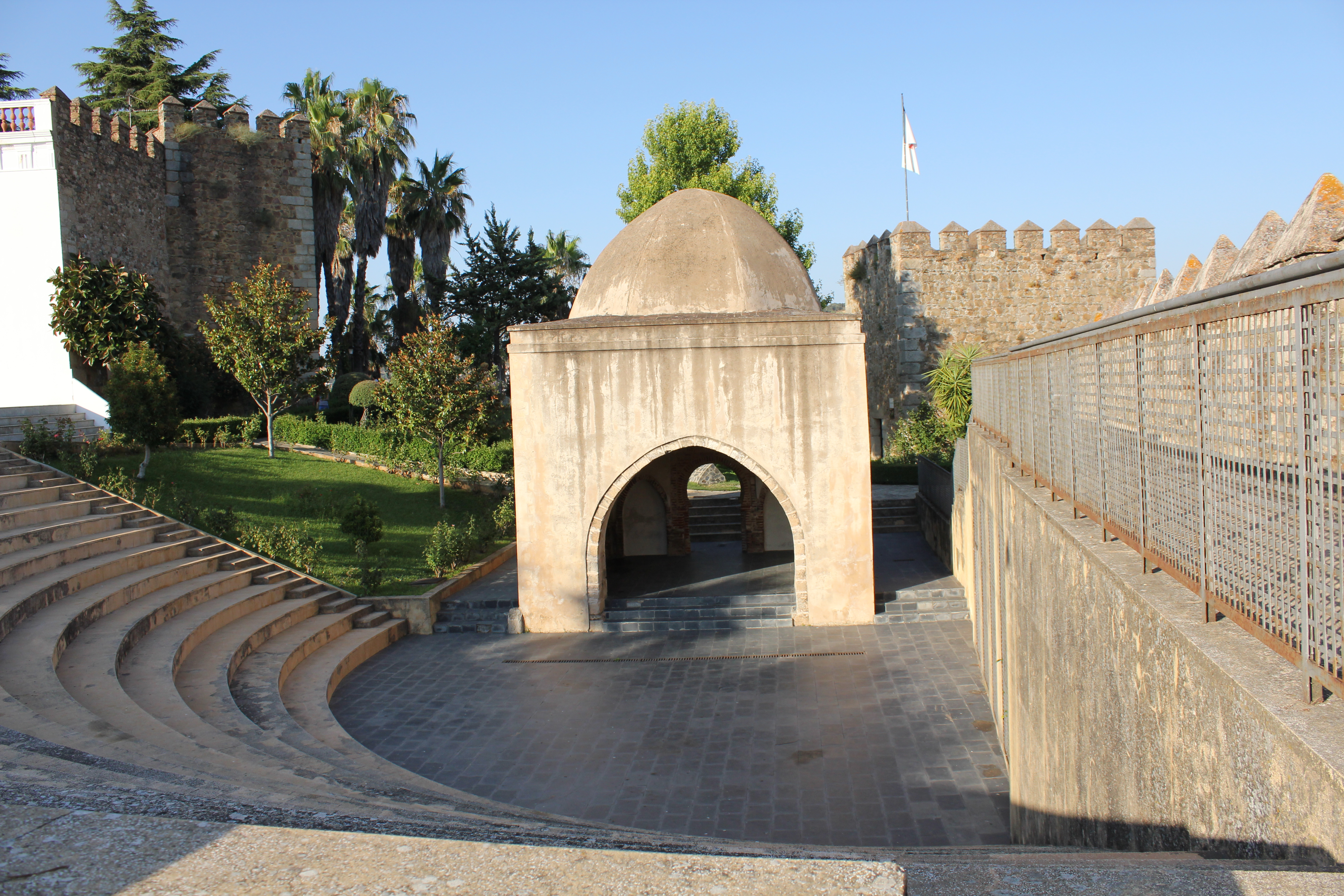 Auditorium situado en la plaza de la alcazaba.